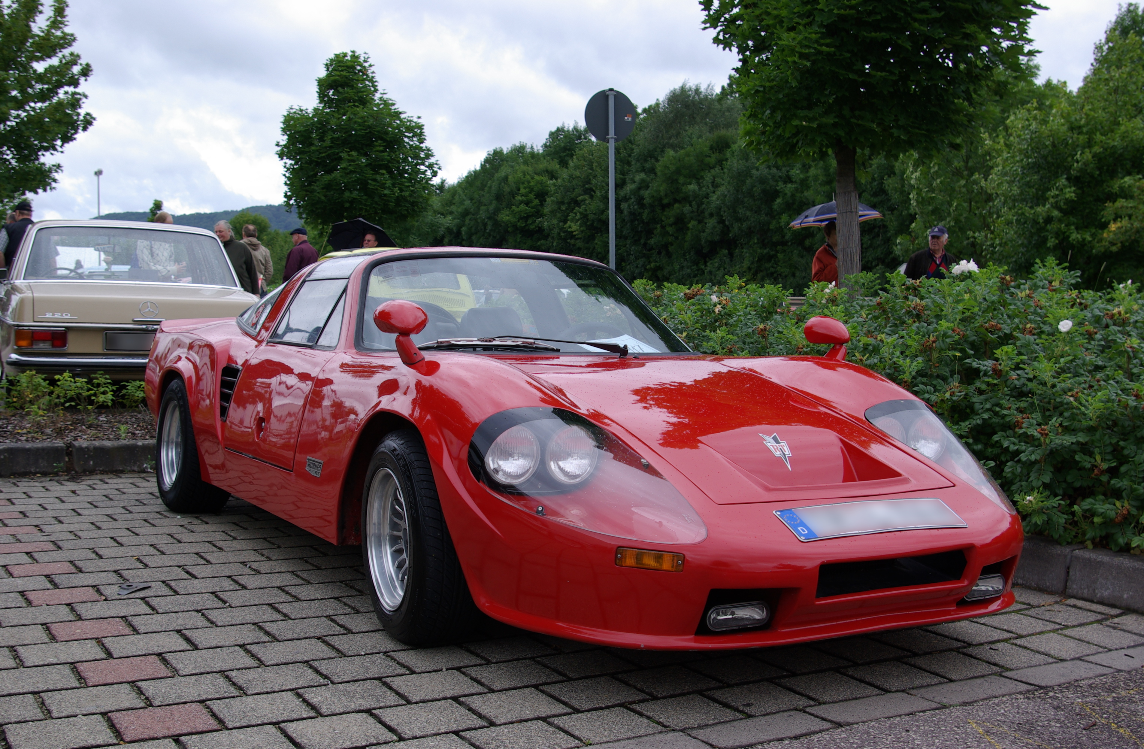 Thurner RS, Baujahr 1974, 75 PSaufgenommen bei / photographed at "25. Internationales Konzer Oldtimer-Treffen", 19. Juli 2009